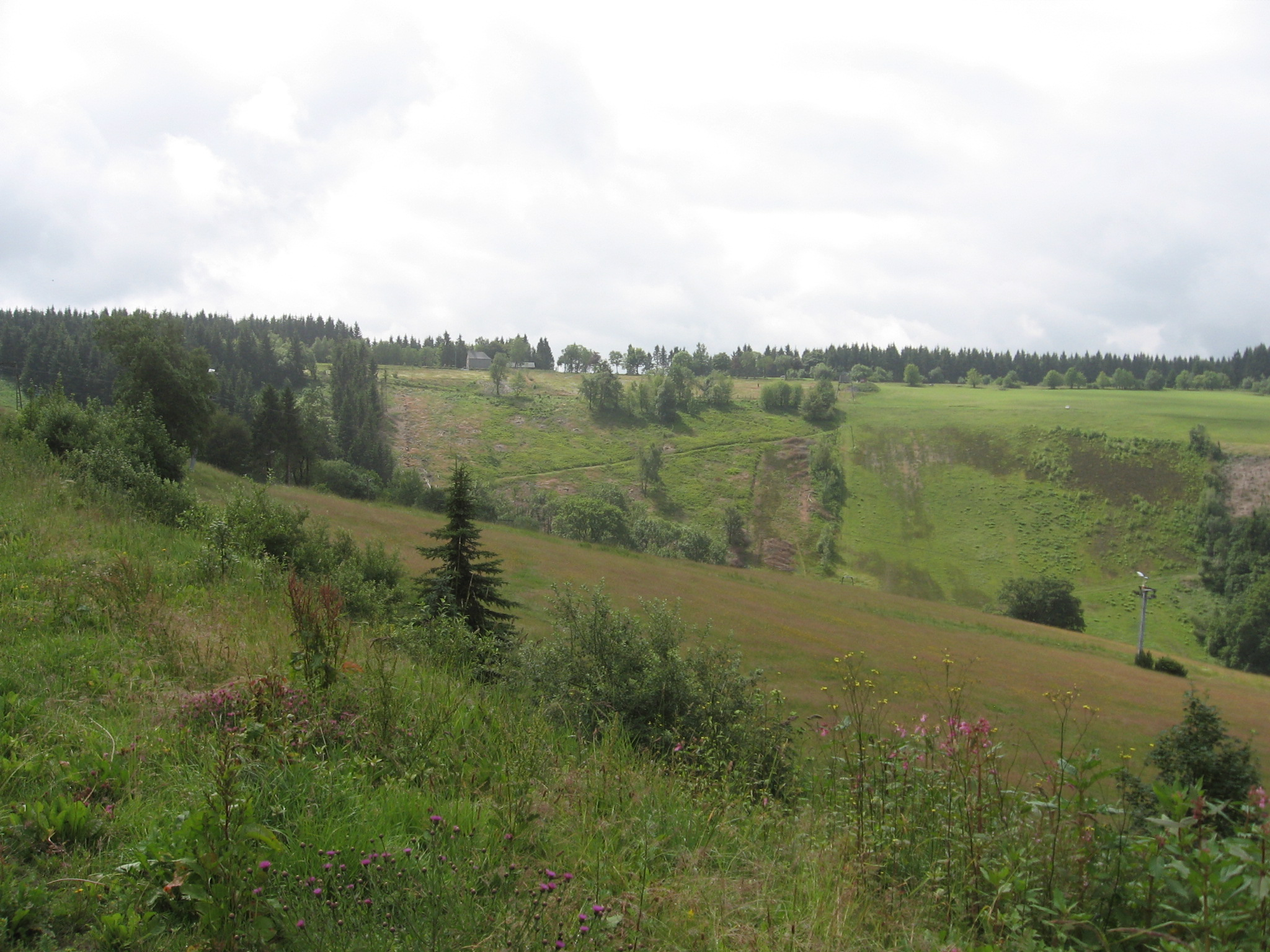 Naturschutzgebiet Bergwiesen bei Altastenberg, Blick vom Parkplatz des Westfalenhangs nach Süden